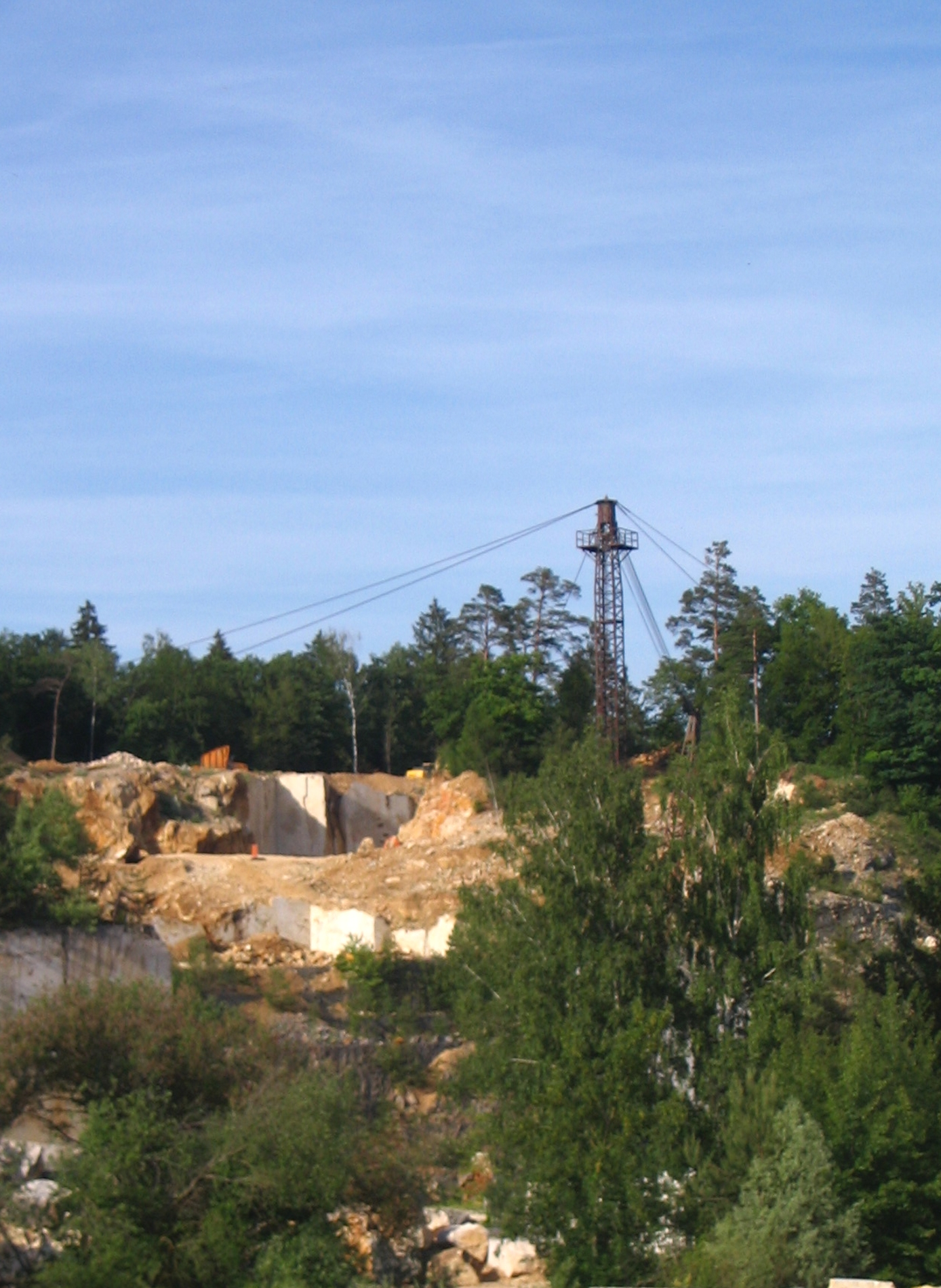 Drosselfels-Kalkstein-Steinbruch in Marching (Neustadt Donau), Landkreis Kelheim, Niederbayern